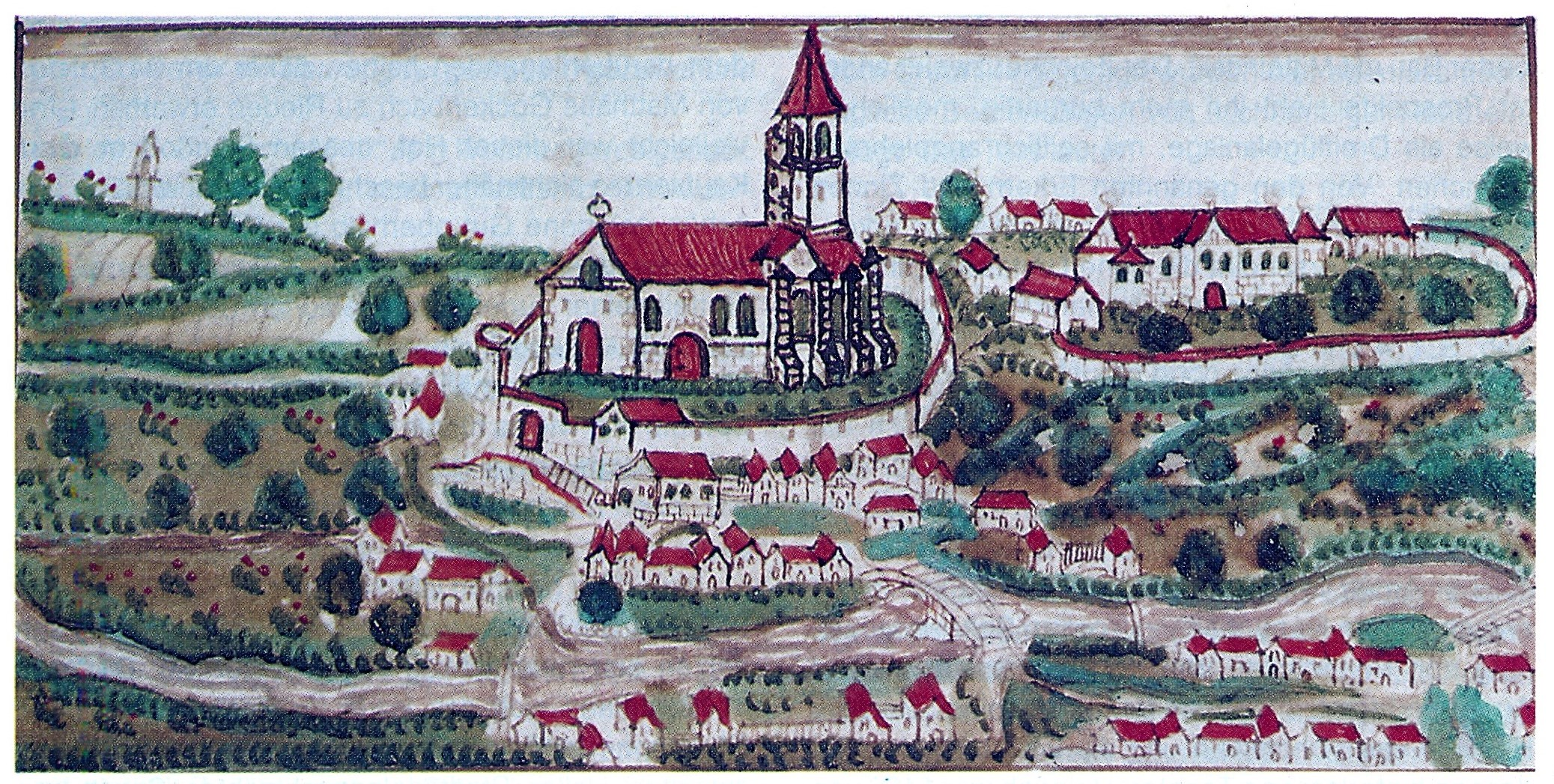 Rieden (heute Stadtteil v. Rosengarten bei Schwäbisch Hall) in der "Städtische rote Chronik" von 1600 der Reichsstadt Schwäbisch Hall